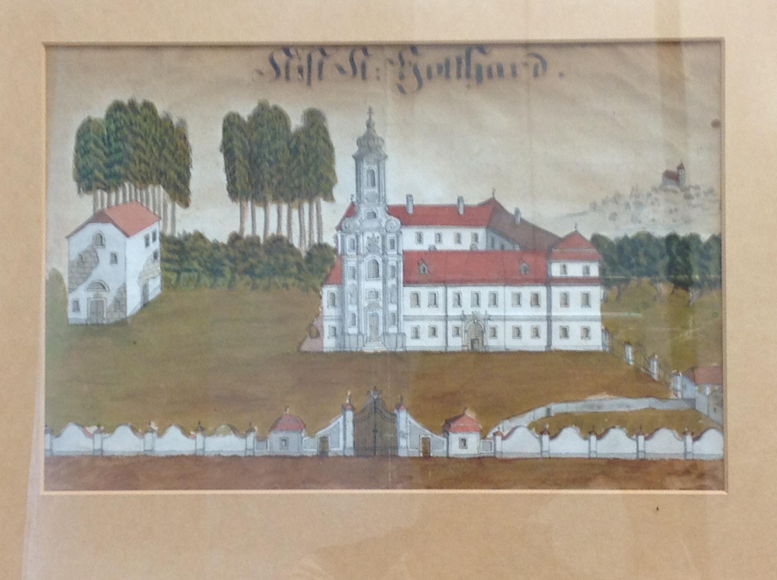 Painting of St. Gotthard (Szentgotthárd) Cistercian Monastery on the current-day border between Austria and Hungary.